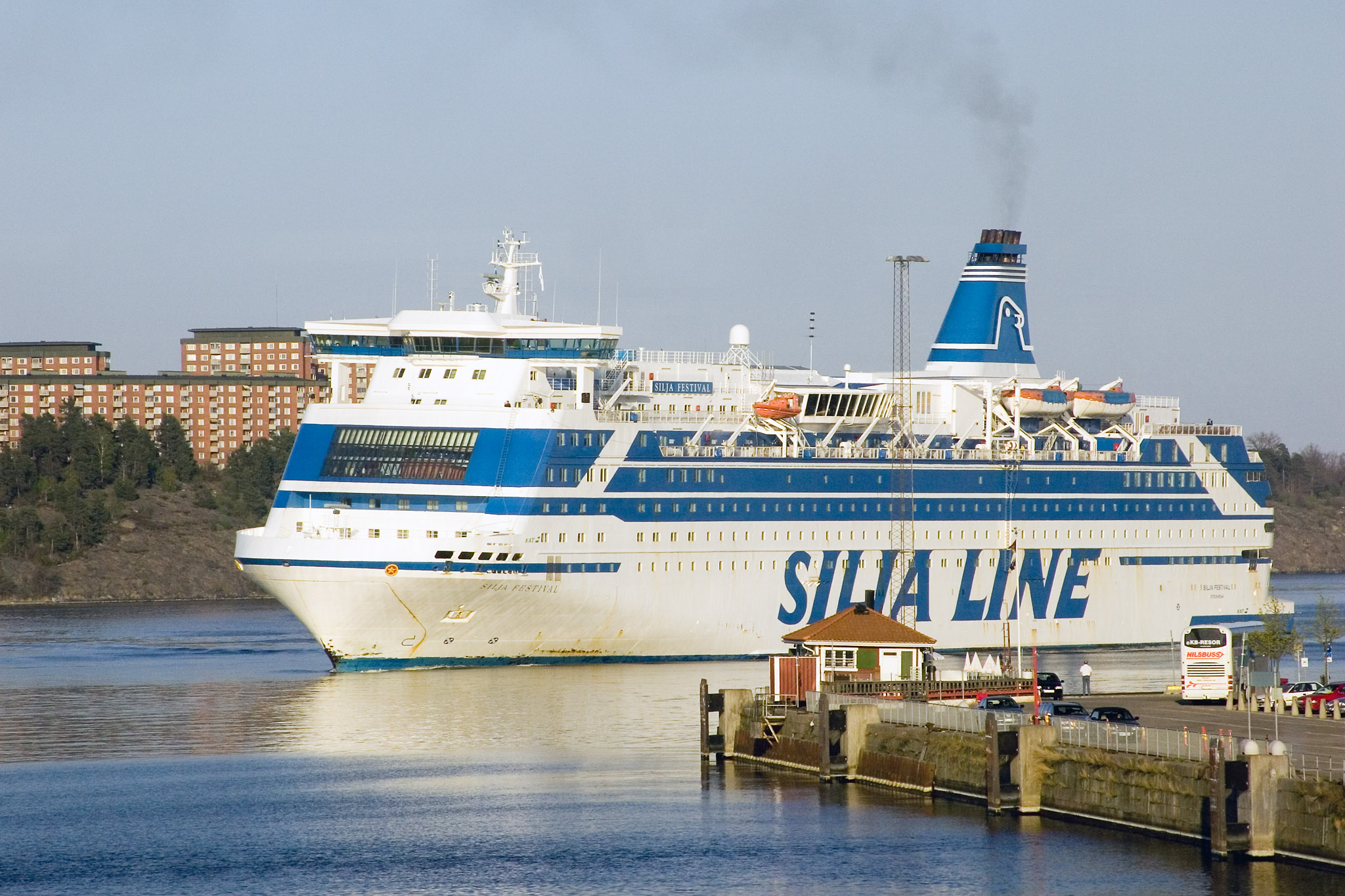 'Silja Festival' is arriving from Turku / Stockholm, Sweden